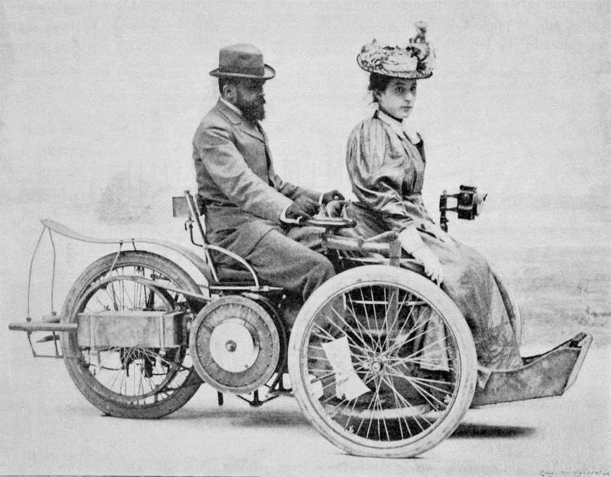 Léon Bollée, madame, et leur tricycle (tricar)